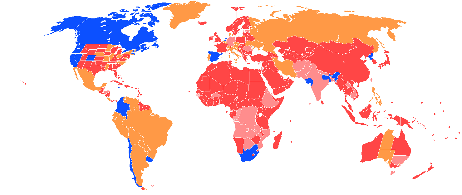 cambiato da file originale canada e corea del nord